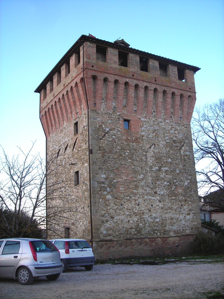 Tower Strozzi, Resina, Perugia, Umbria, Italy